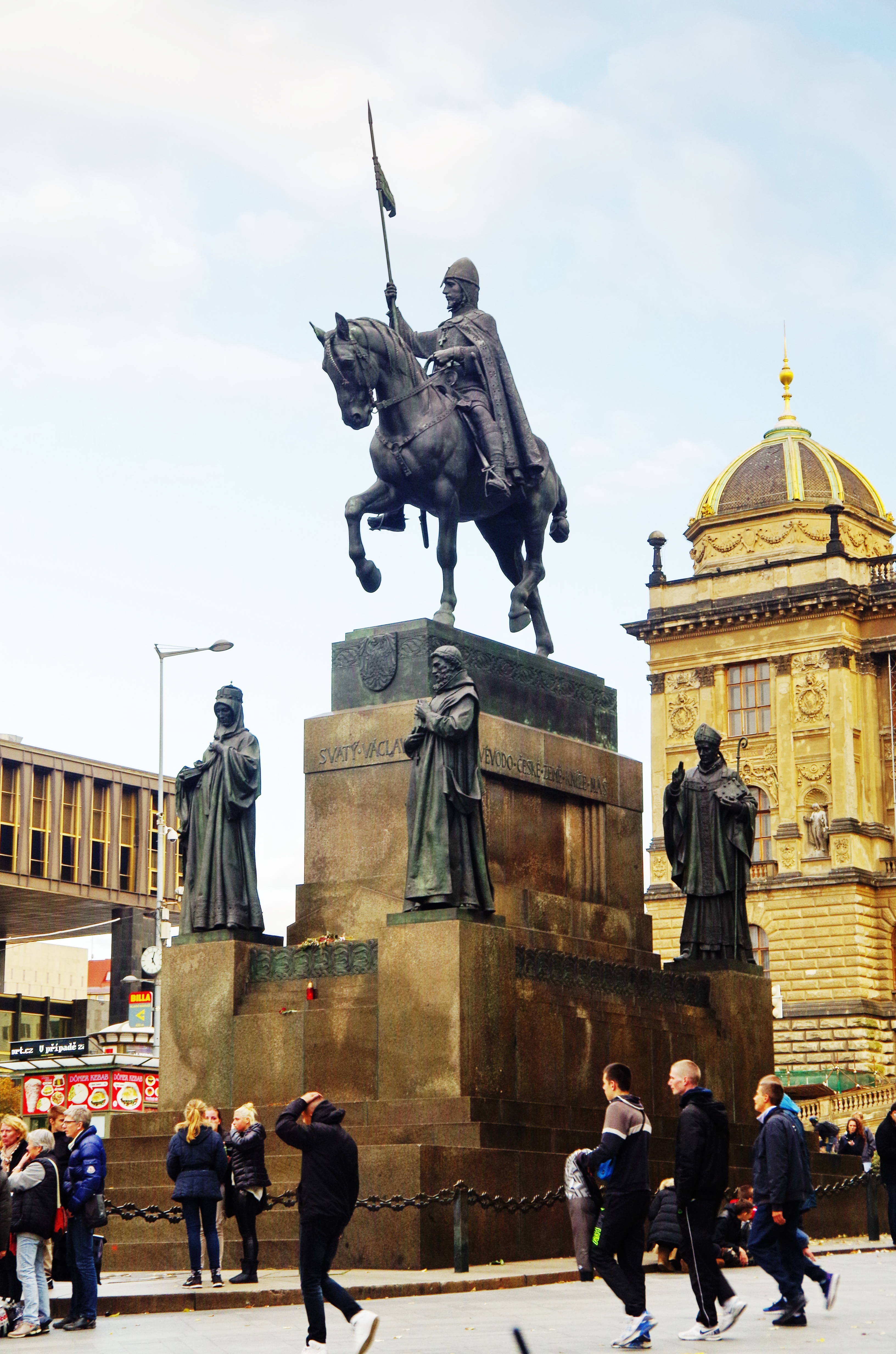 Statue von St. Wenzel auf dem Wenzelsplatz, Prag